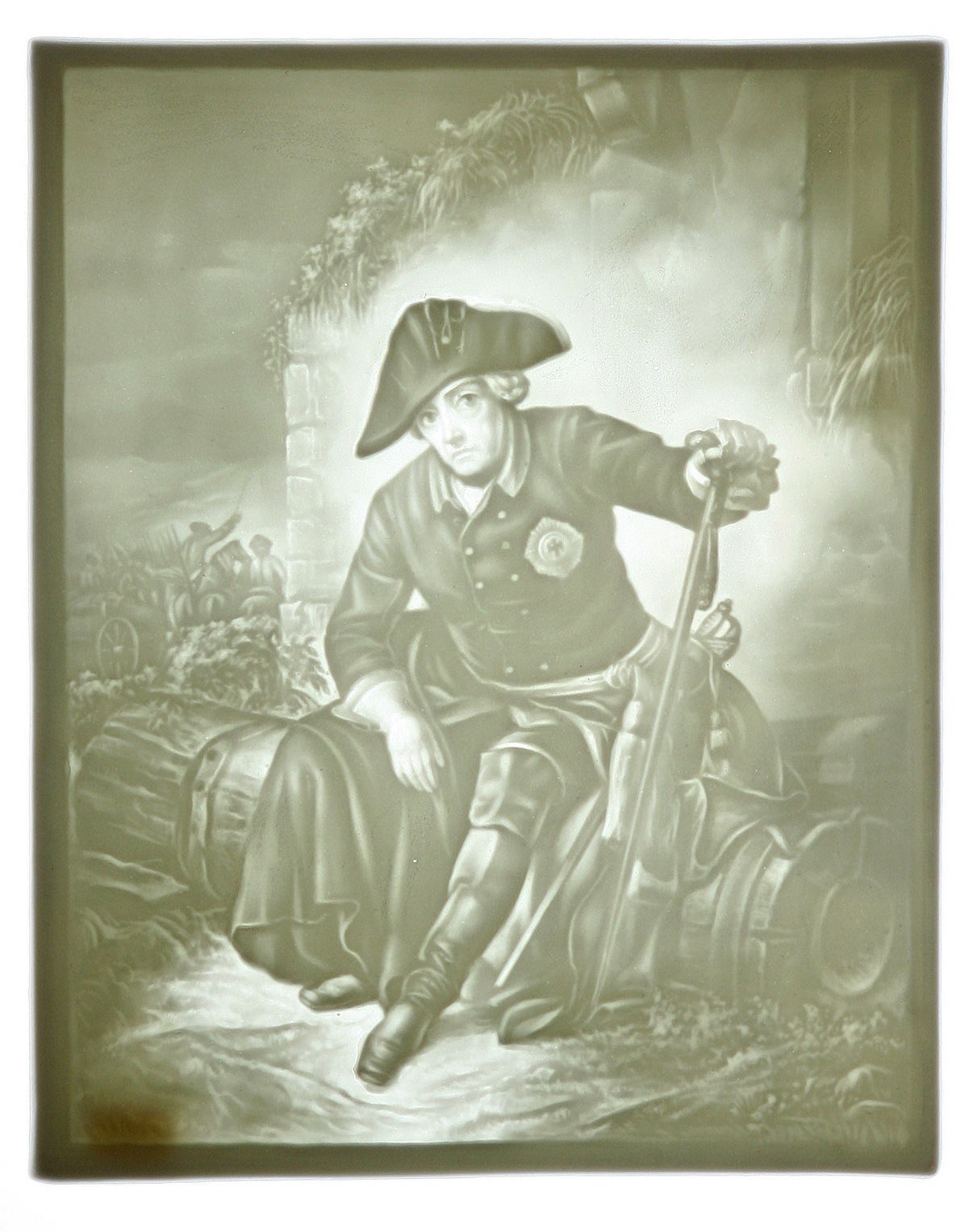 Lithophanie mit Durchlicht, Vorlage: Gemälde „Friedrich II. nach der Schlacht von Kolin“ von Julius Schrader, Original im Museum der bildenden Künste Leipzig